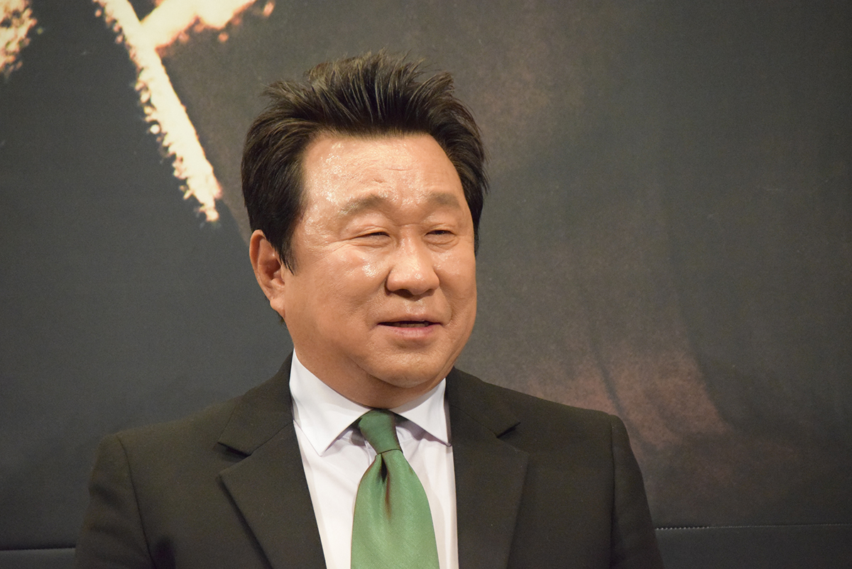 임하룡 OCN오리지널 '구해줘2' 제작발표회 (2019.4.30)